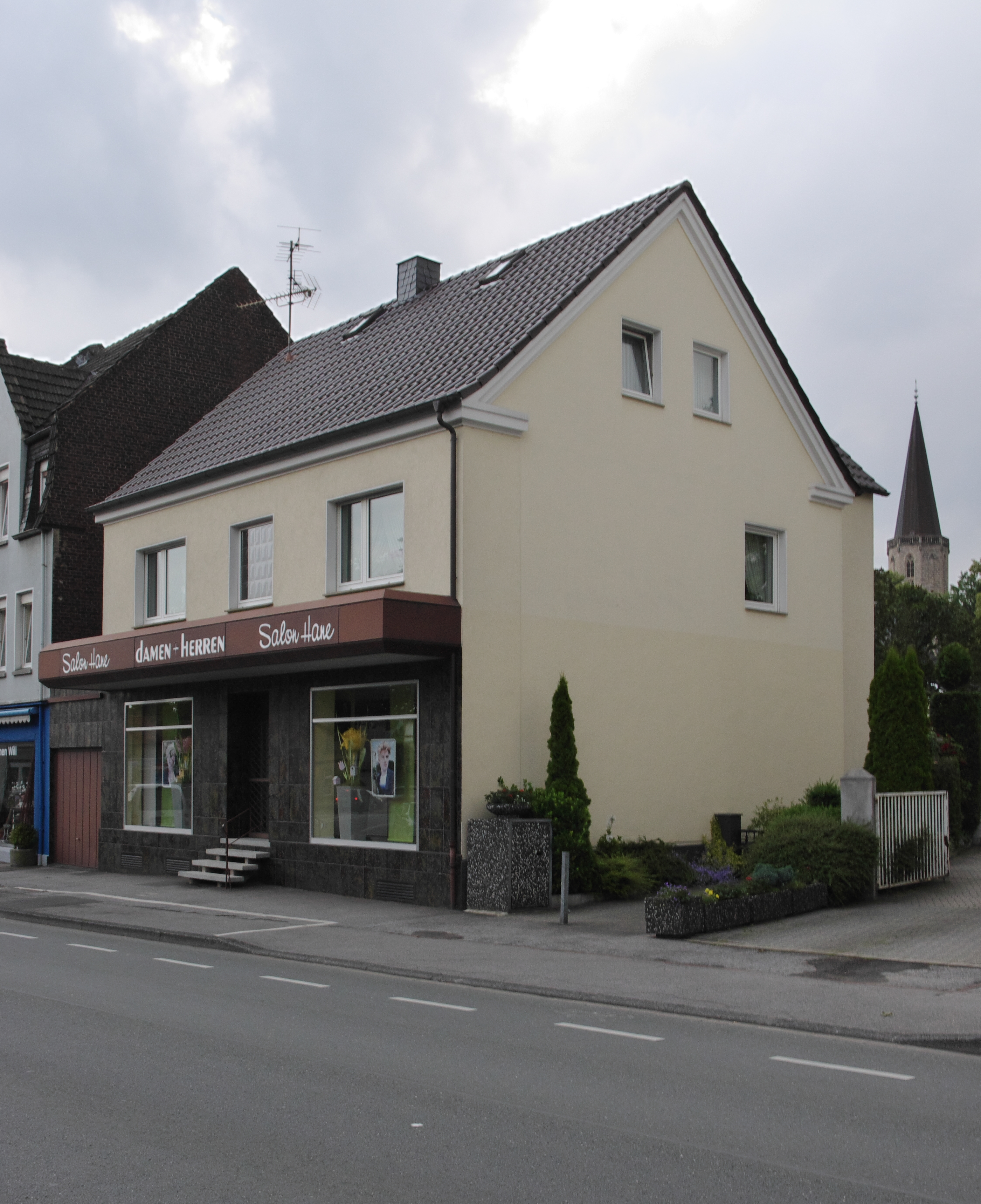 Haus in Dortmund